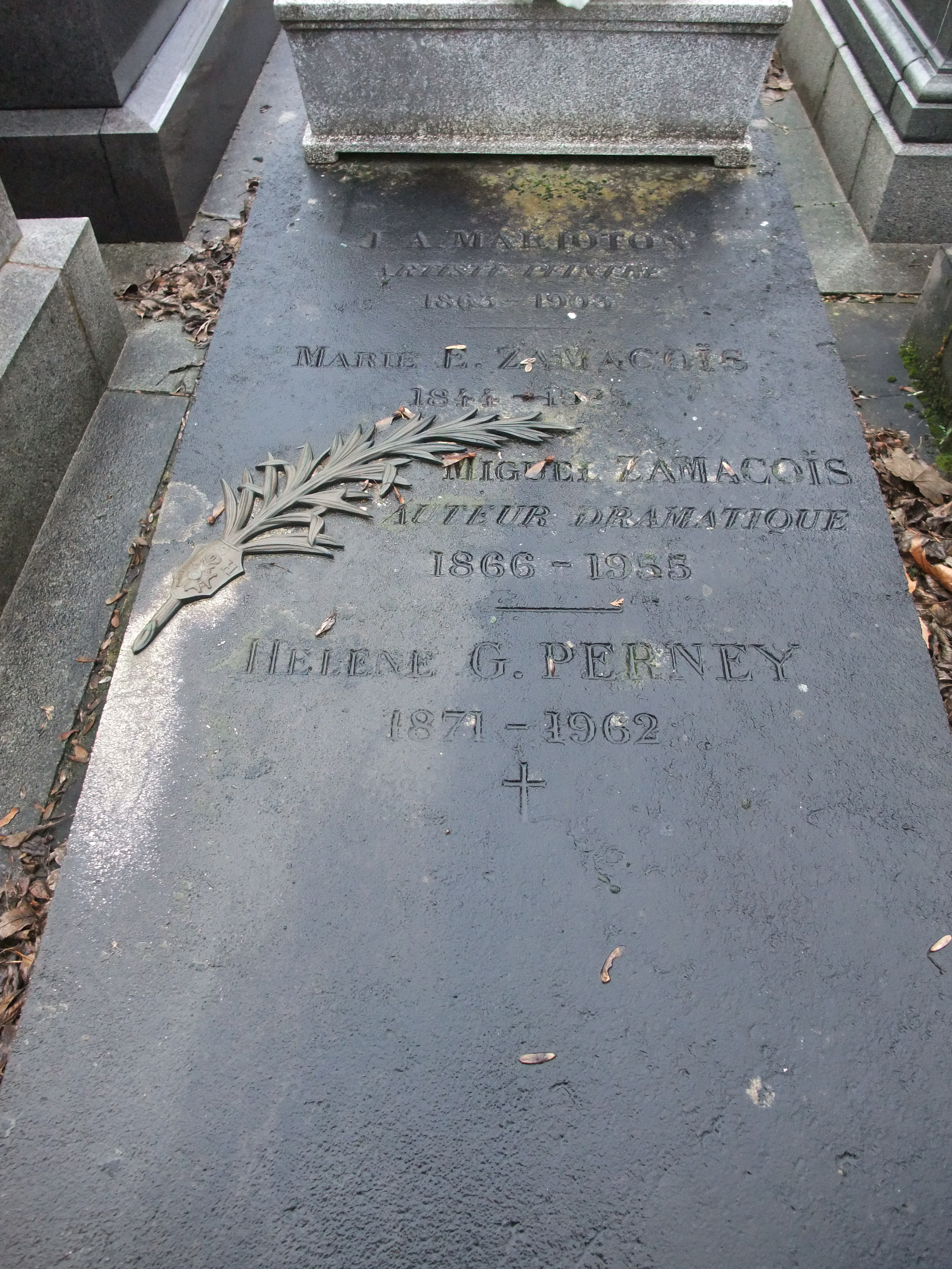 tombe de Miguel Zamacois, cimetière du Père Lachaise, Paris